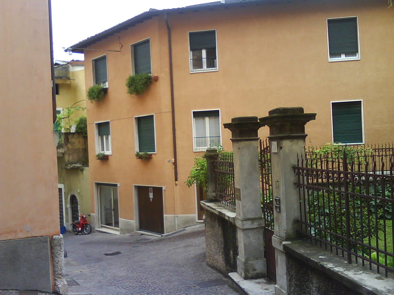 l'ex casa del bandito Giovanni Beatrici a Gargnano